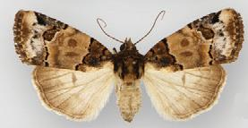 Bryolymnia biformata female